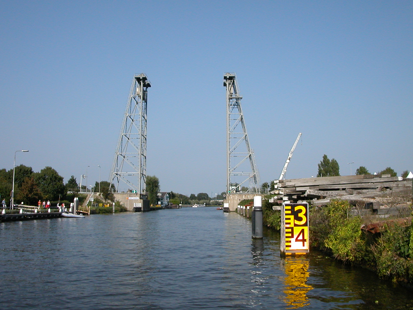 Hefbrug van Alphen aan den Rijn